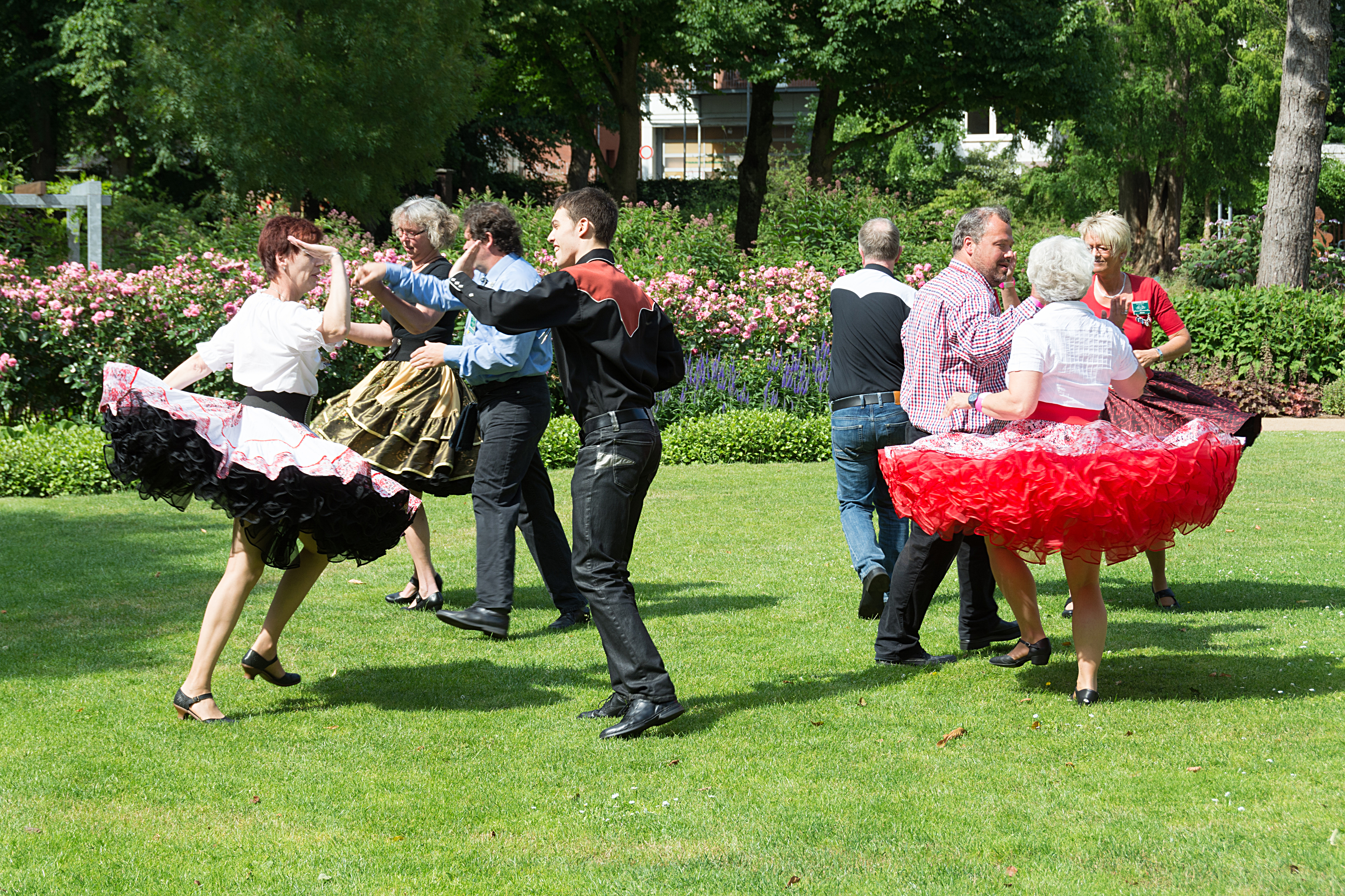 Eine Square-dance-Gruppe in Itzehoe auf dem Museumsfest 2014